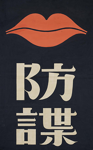 Diseño grafico japones